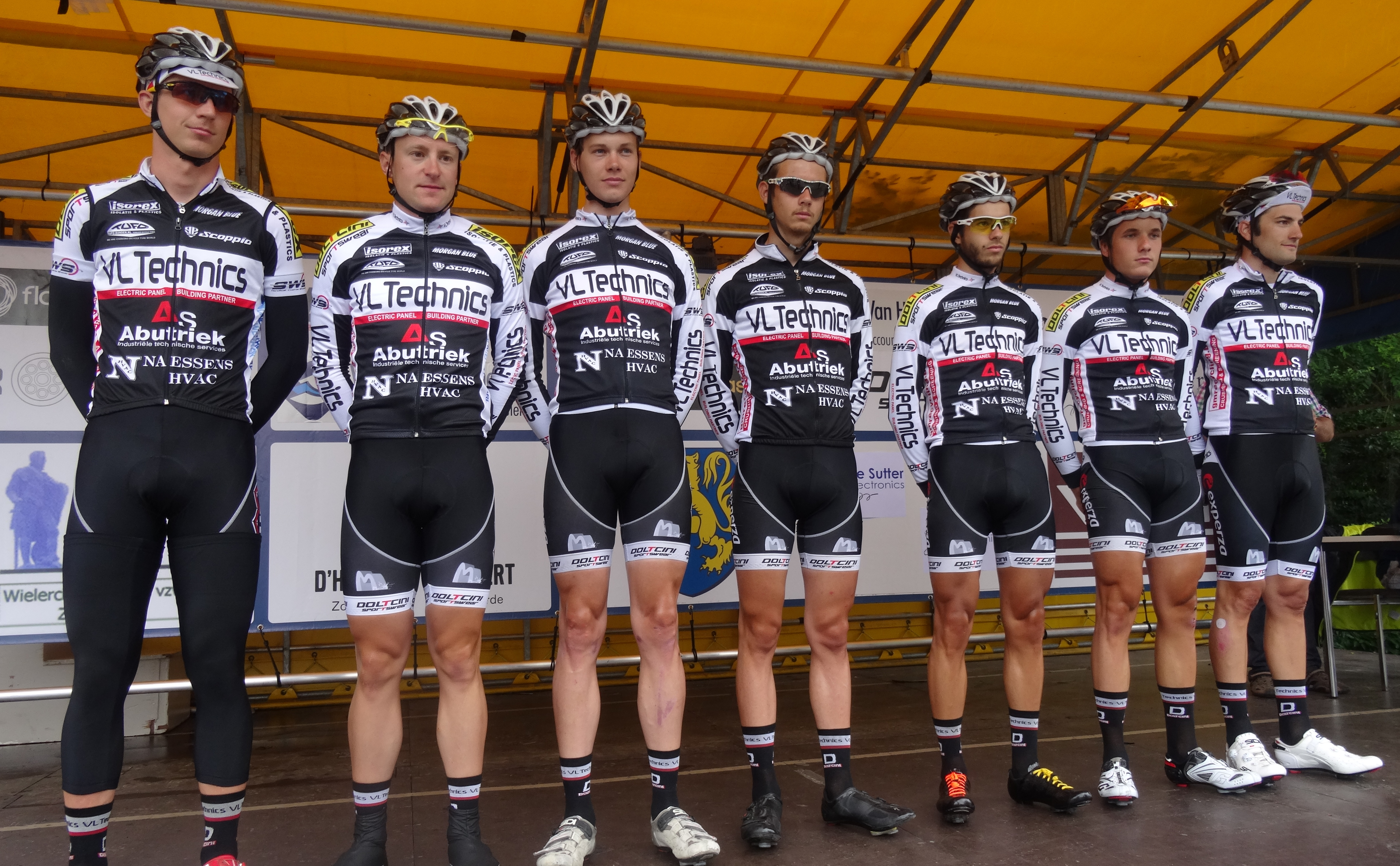 Reportage photographique réalisé le samedi 5 juillet à l'occasion du départ et de l'arrivée du Circuit Het Nieuwsblad espoirs 2014 à Grotenberge (Zottegem), Belgique.